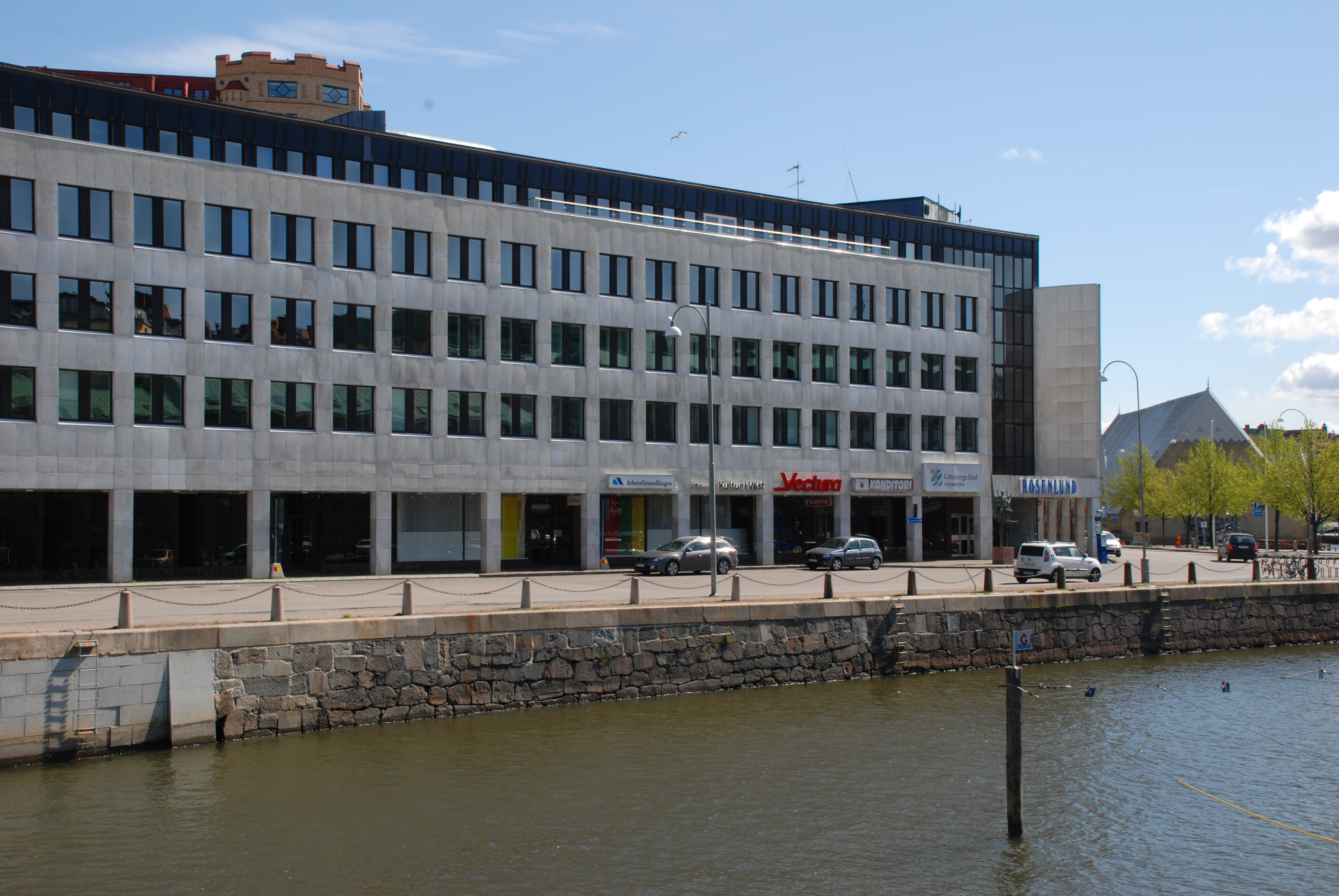 Rosenlundsgatan och Rosenlundskanalen sedd från Pustervik i Göteborg.